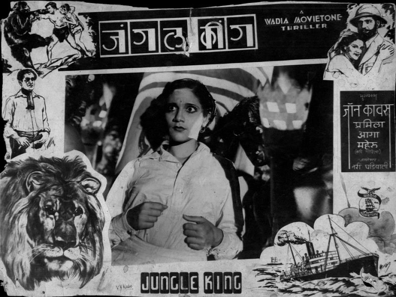 Carte publicitaire pour Jungle King (1939)